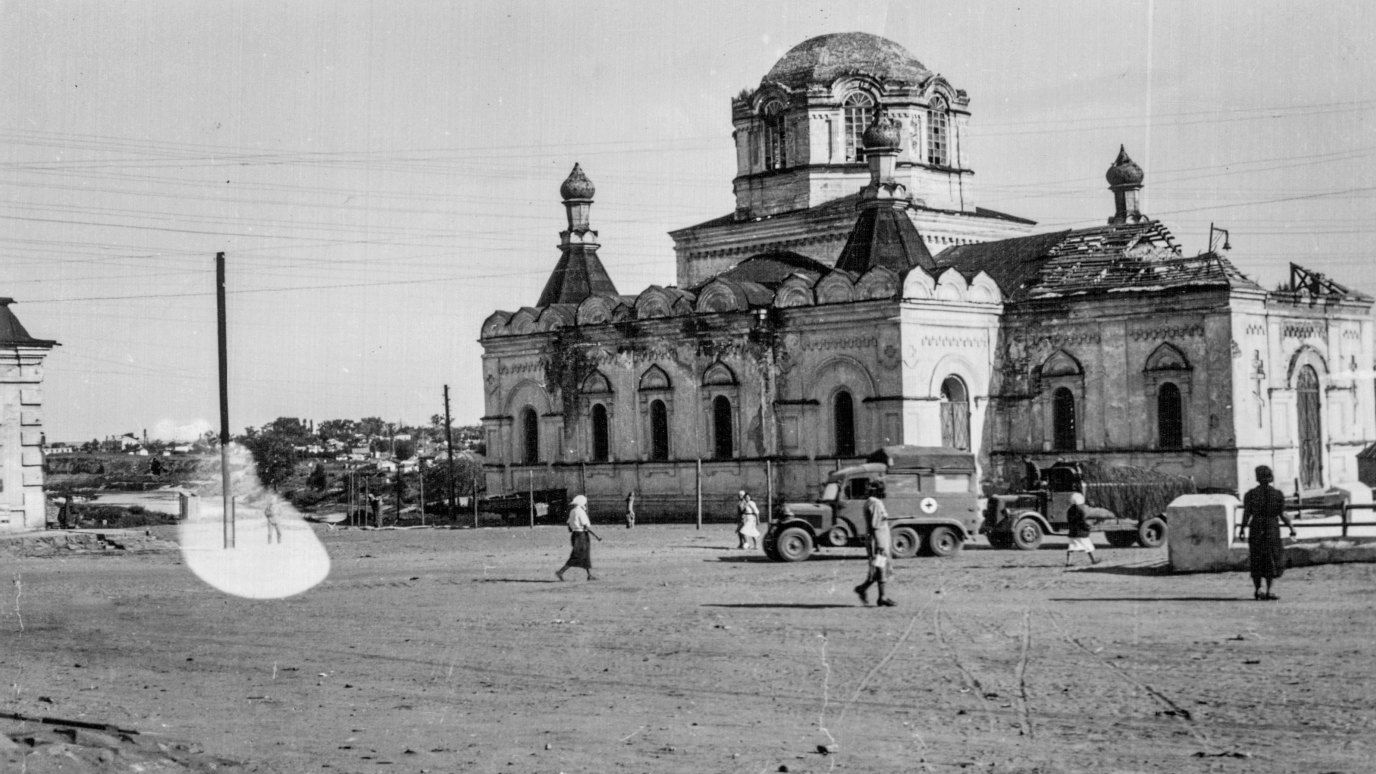 Церковь Введения во храм Пресвятой Богородицы в годы оккупации 1942-1943 гг. Город Белая Калитва